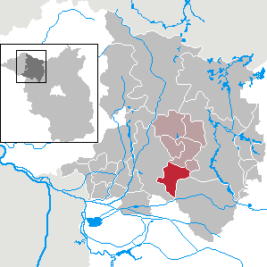 Temnitztal in Brandenburg (Country) - District Ostprignitz-Ruppin